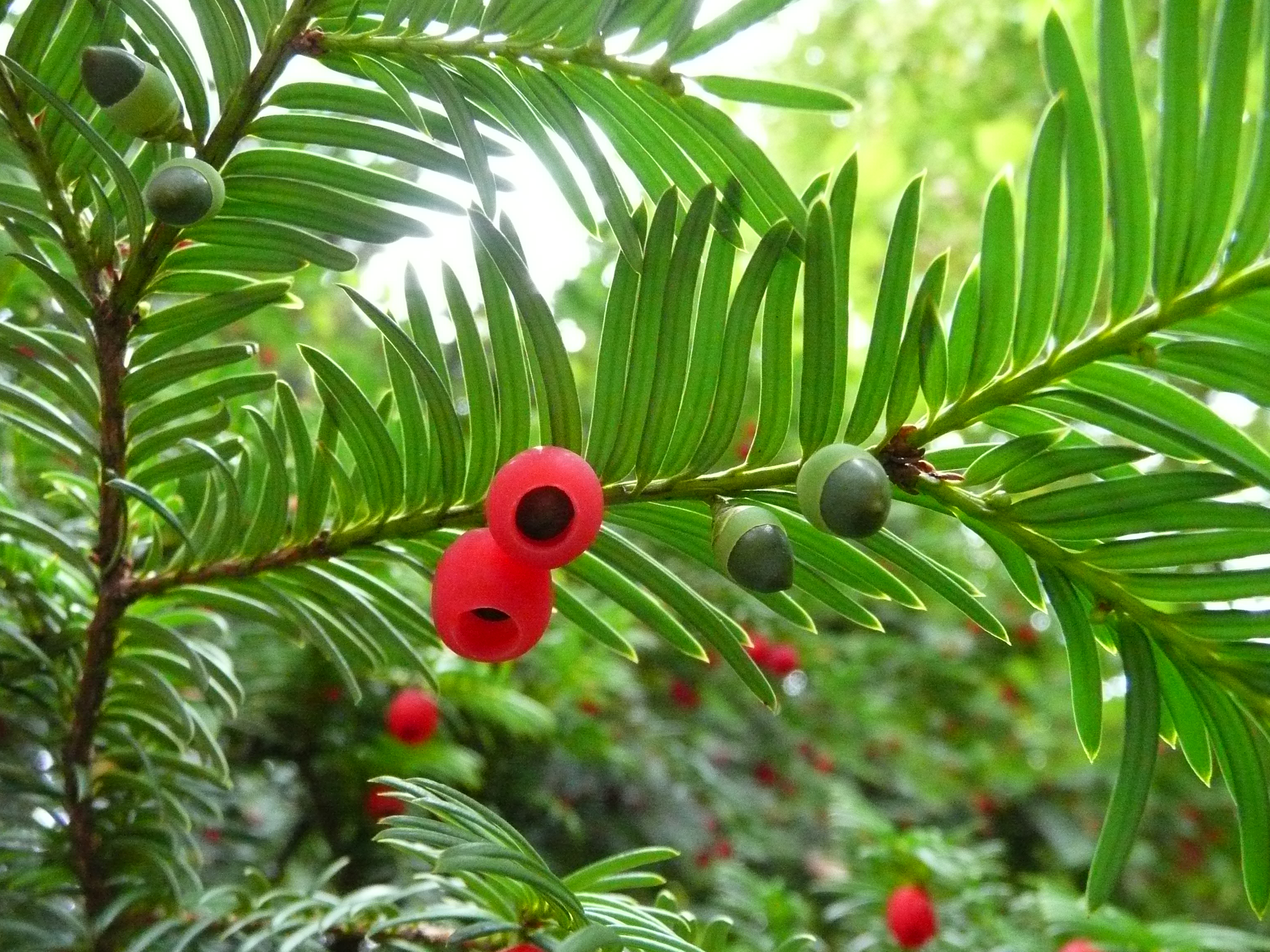 Eibe (Taxus baccata var. dovastoniana?)